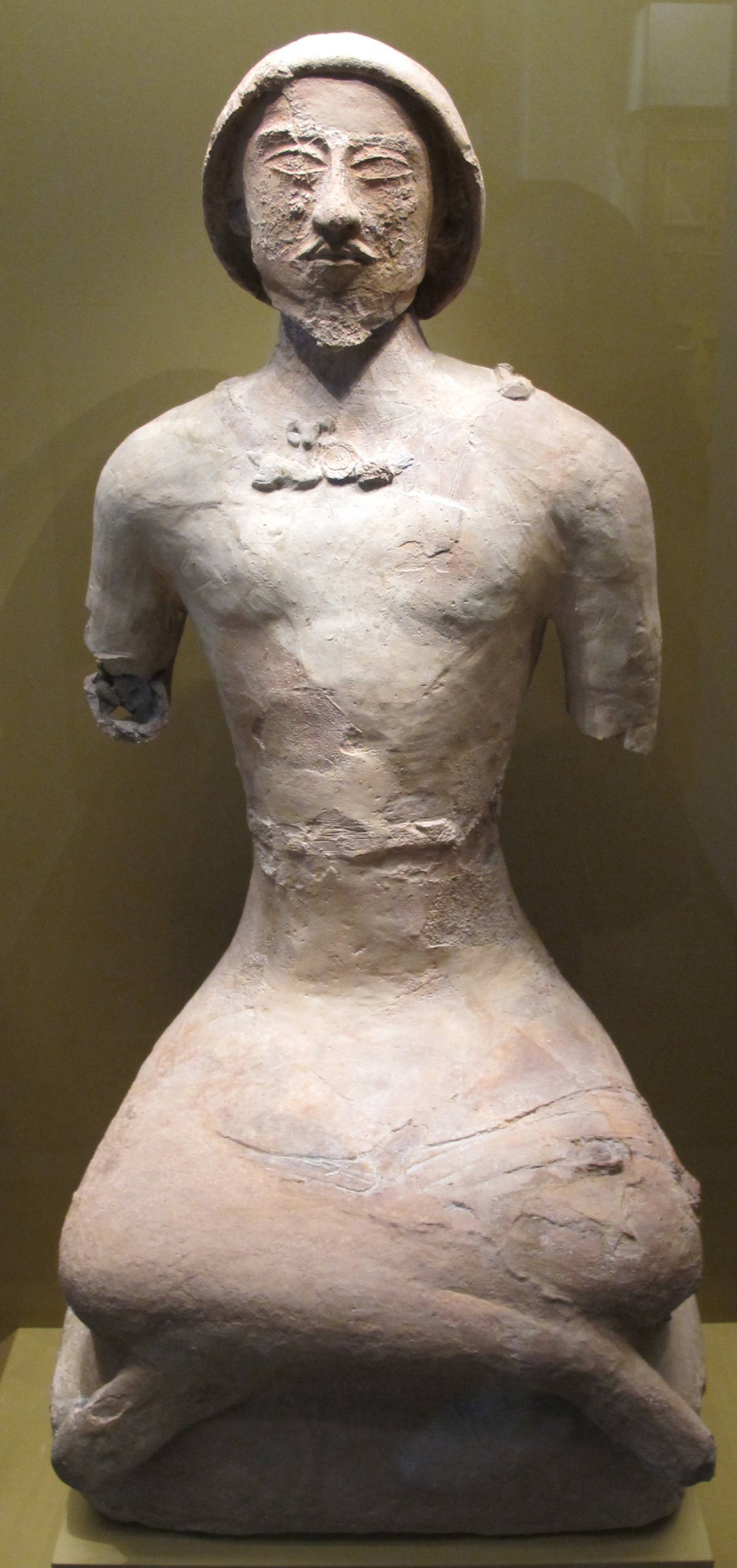 Statua virile-ossario, dintorni di koy-krylgan-kala, I-III sec